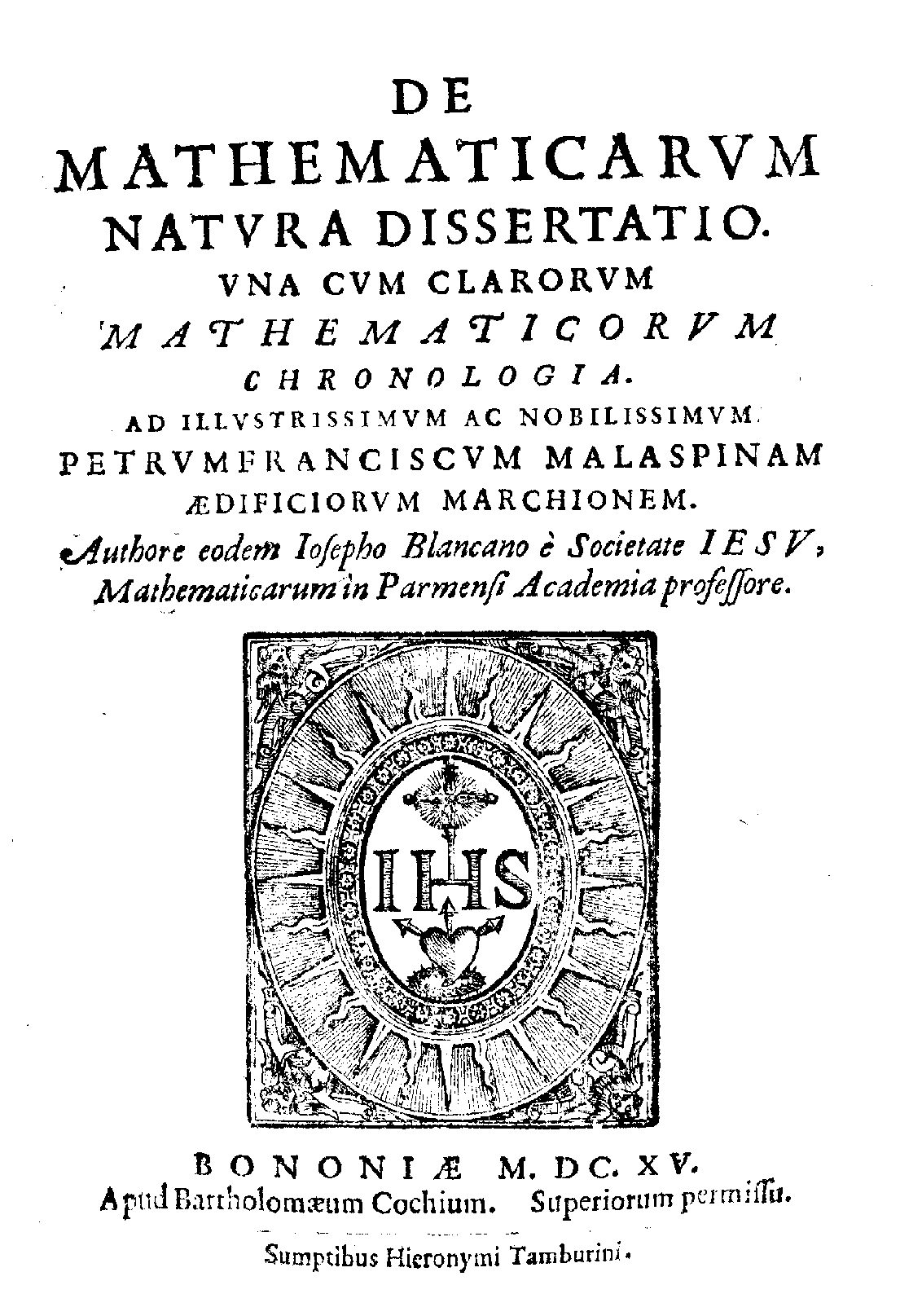 De mathematicarum natura dissertatio. vna cum clarorum mathematicorum chronologia ... Authore Iosepho Blancano ... . - Bononiae : apud Bartholomaeum Cochium : sumptibus Hieronymi Tamburini (Bononiae : apud Bartholomaeum Cochium, 1615), 1615. - 65, [7] p. ; 4º. - Pt. 2 di : Aristotelis loca mathematica ex vniuersis ipsius o Aristotelis loca mathematica ex vniuersis ipsius operibus collecta, & explicata. Aristotelicae videlicet expositionis complementum hactenus desideratum. Accessere de natura mathematicarum scientiarum tractatio; atque clarorum mathematicorum chronologia. Authore Iosepho Blancano Bononiensi e Societate Iesu, ... . - Bononiae : apud Bartholomaeum Cochium : sumptibus Hieronymi Tamburini, 1615 (Bononiae : apud Bartholomaeum Cochium, 1615) .